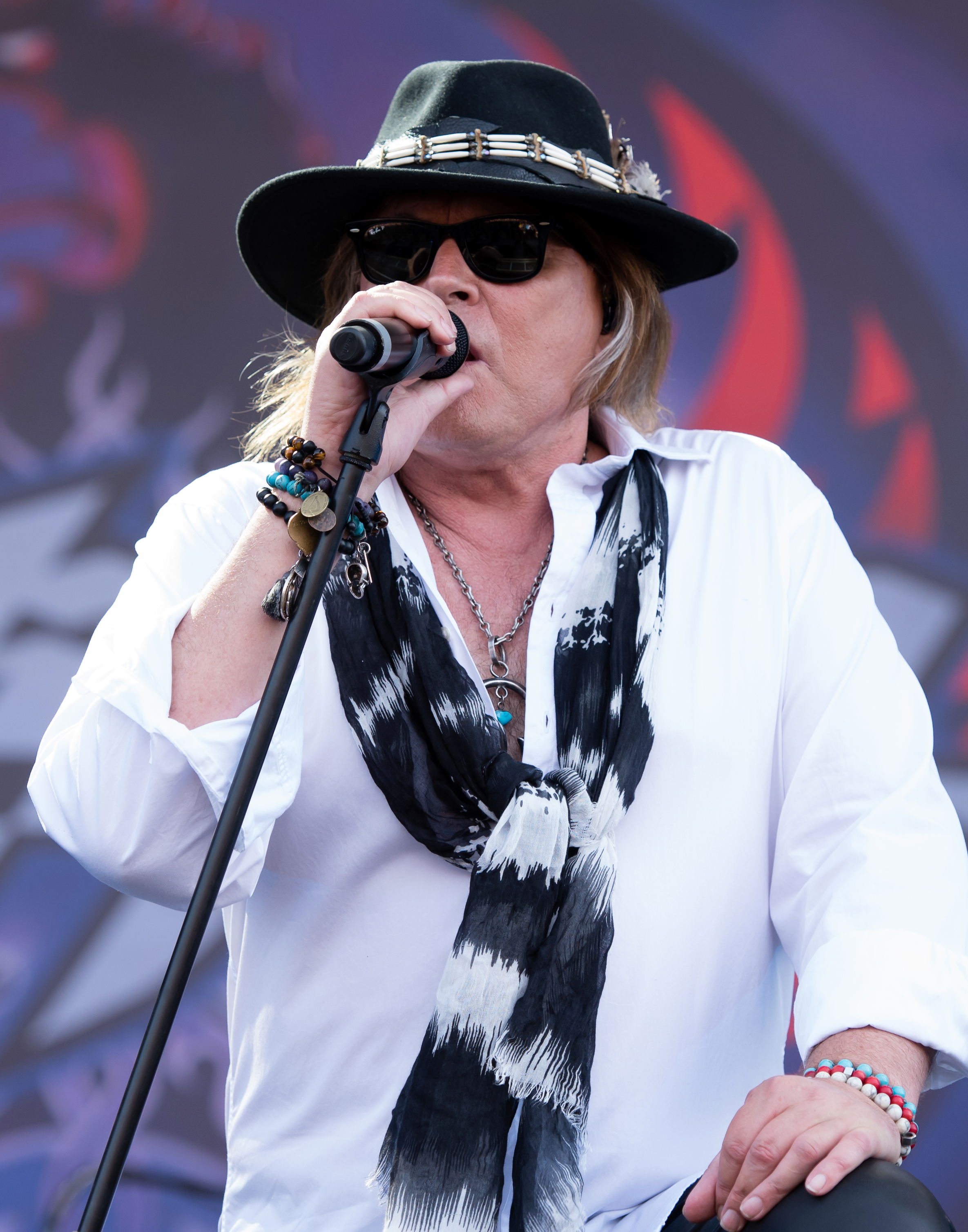 Dokken beim Wacken Open Air 2018